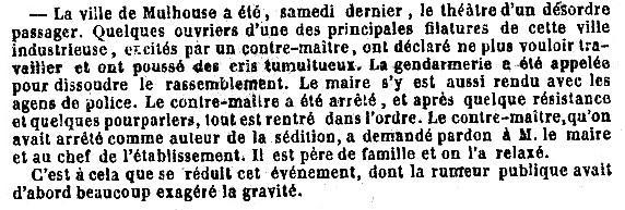 Compte-rendu d'un conflit du travail survenu le samedi 5 mars 1836 à Mulhouse.